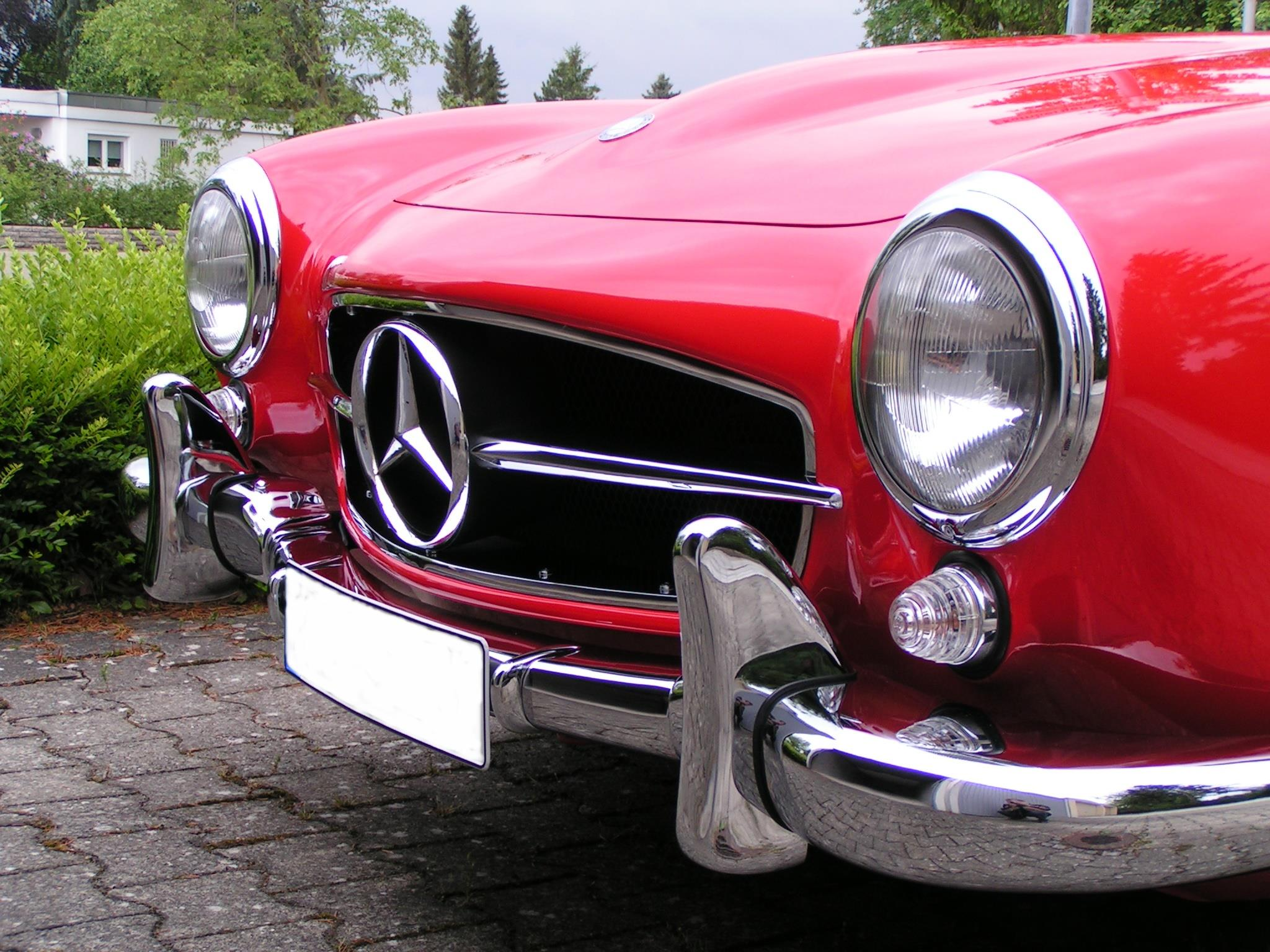 190 SL Frontansicht